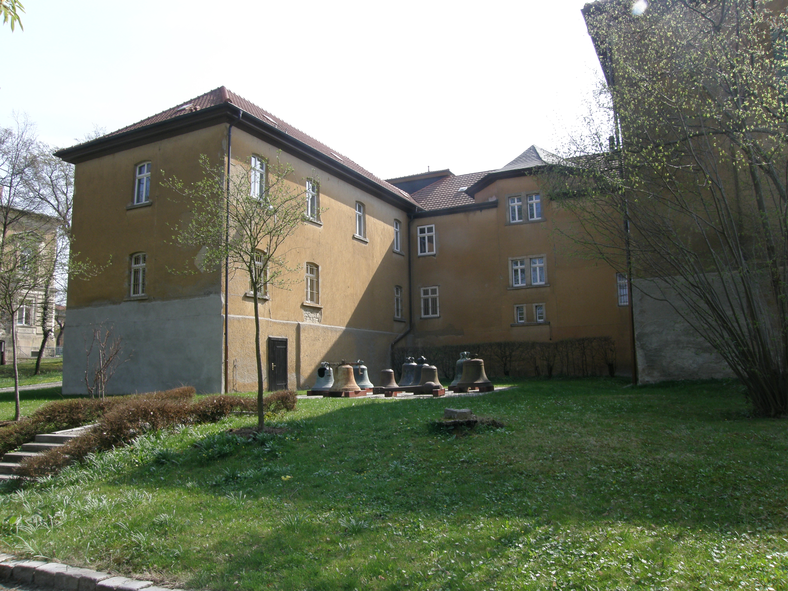 Stadt Apolda - Rückseite des Glockenmuseums